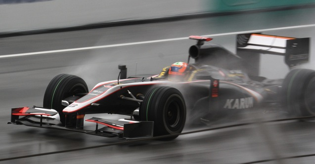 Chandhok malaysia